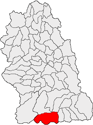 Categorie:Hărţi ale judeţului Hunedoara